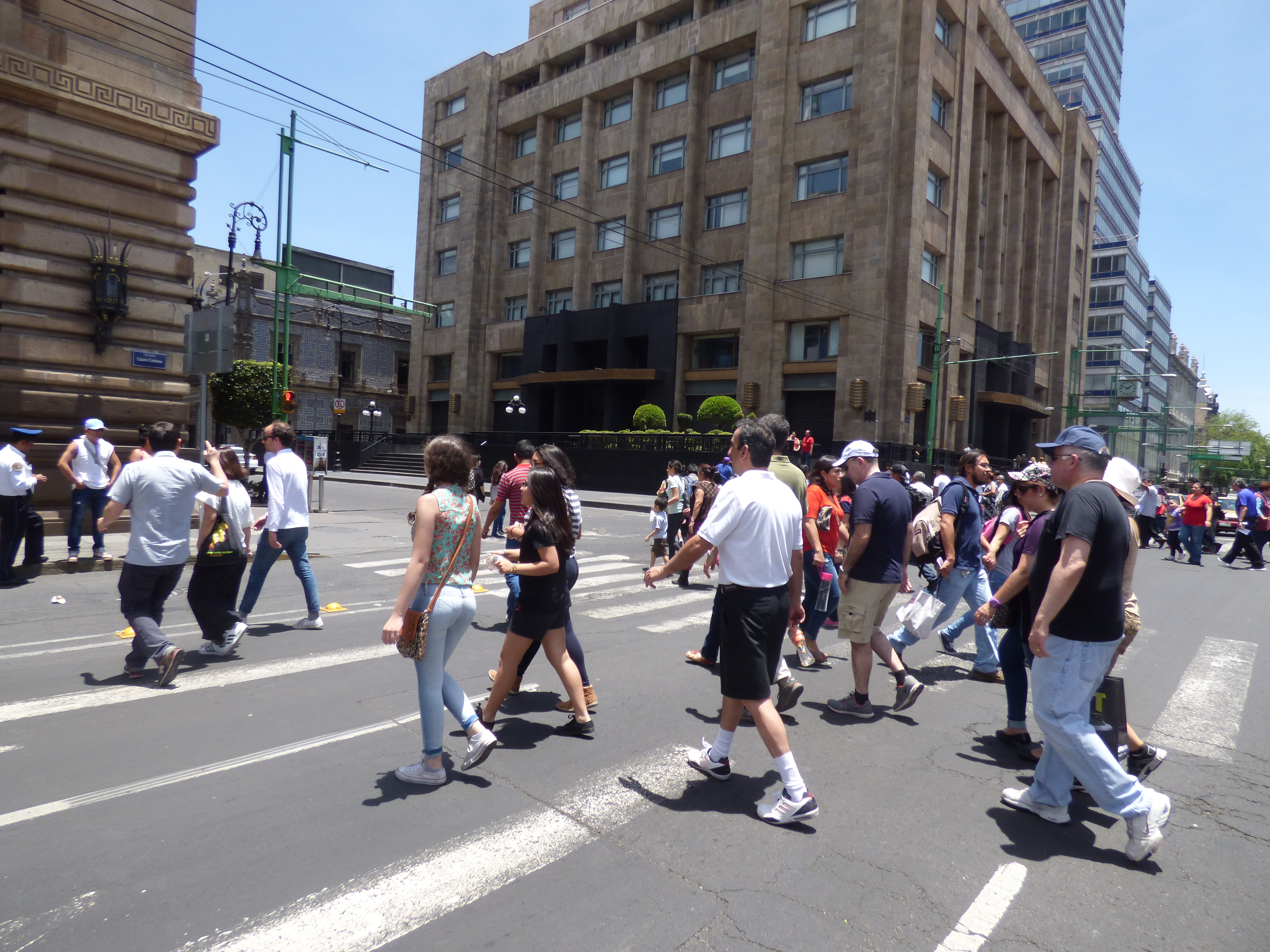 Paso peatonal del Eje central y 5 de mayo